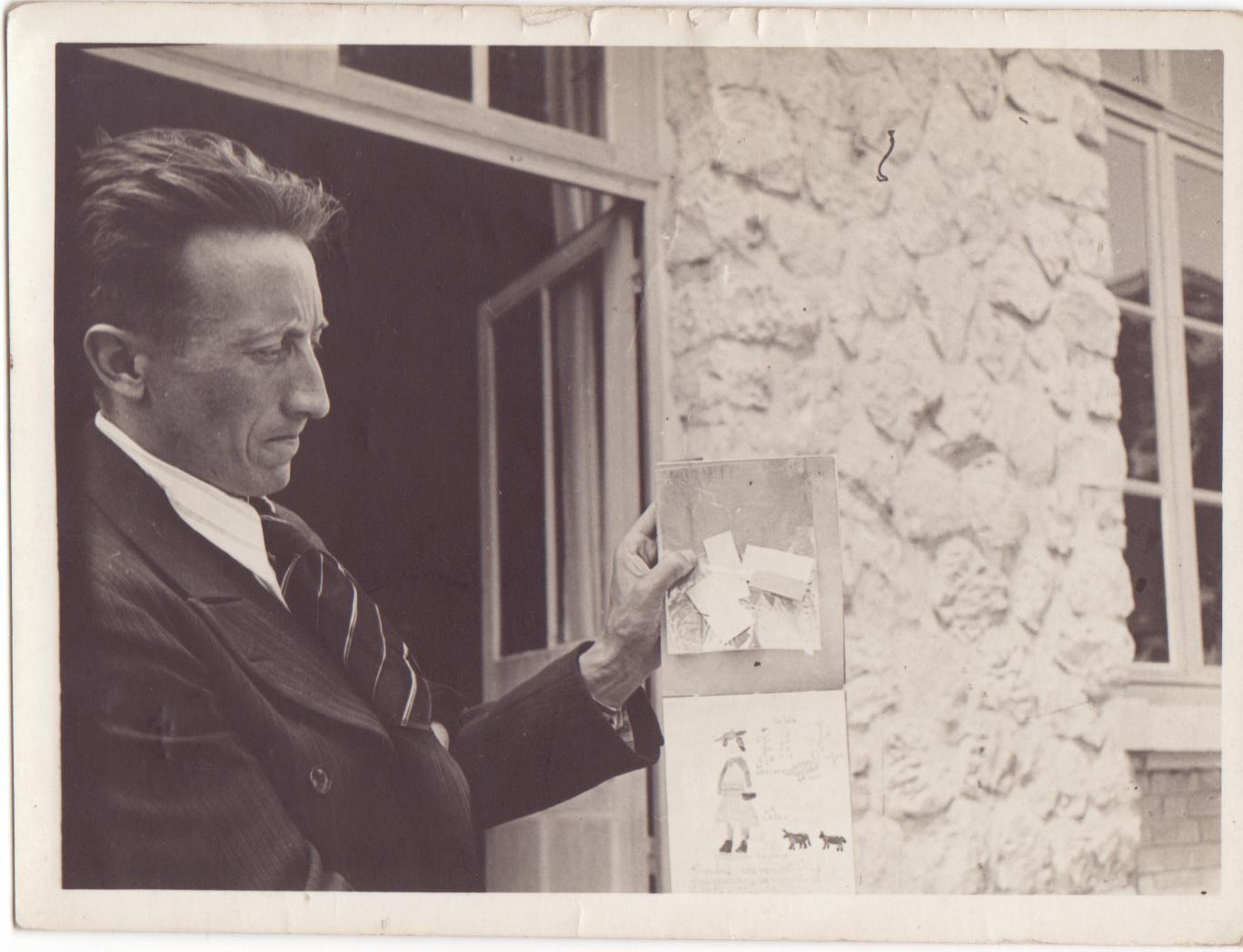 Photo de Robert Duterque, probablement en 1940